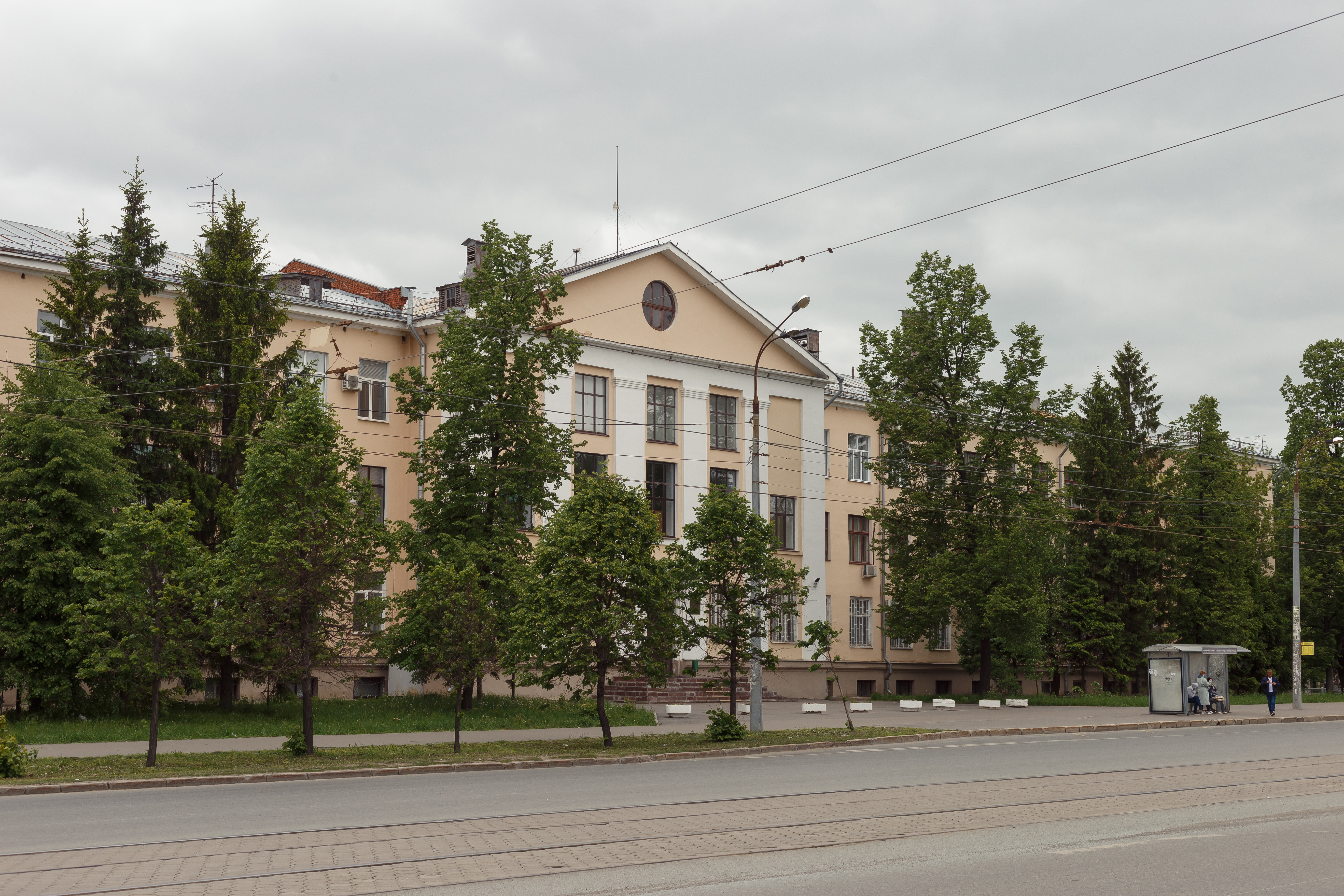 Здание института расположено на ул. Ершова у остановки общественного транспорта, напротив ККИ РУК.